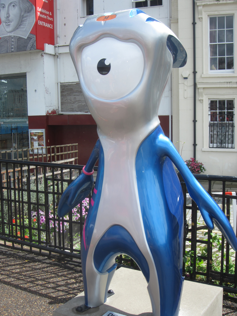 Globe Mandeville